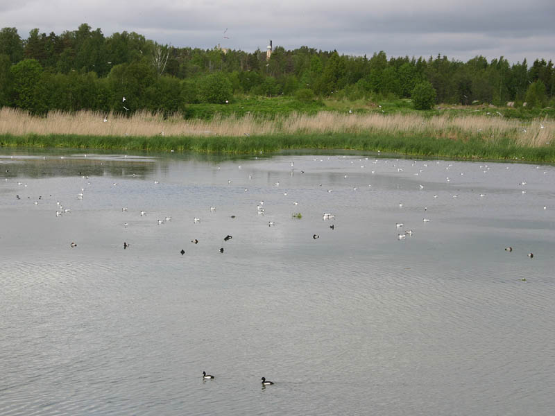 Birds at Suomenoja, Espoo, Finland